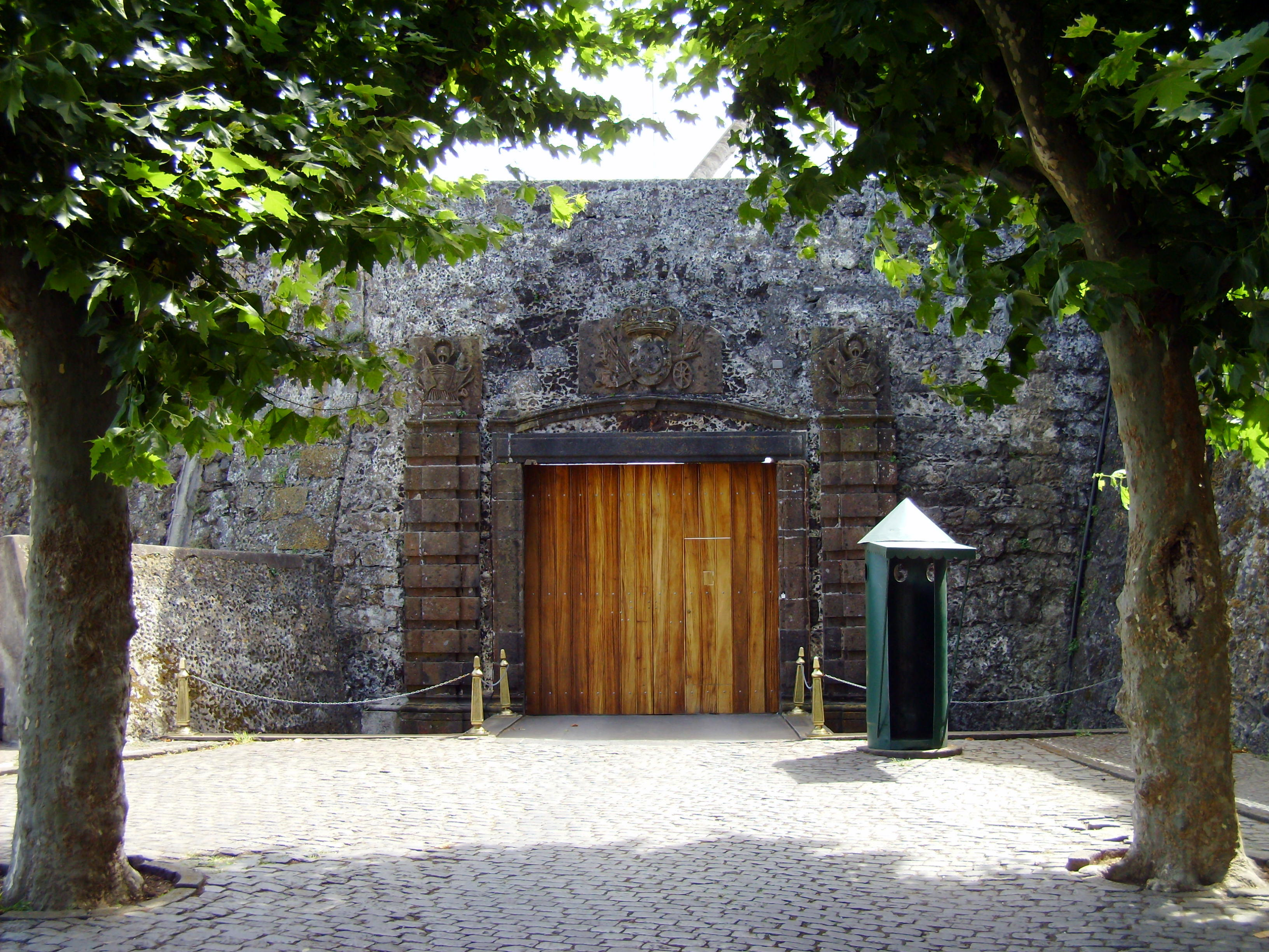 Forte de São Brás, Ponta Delgada, Ilha de São Miguel, Açores: portão de armas.